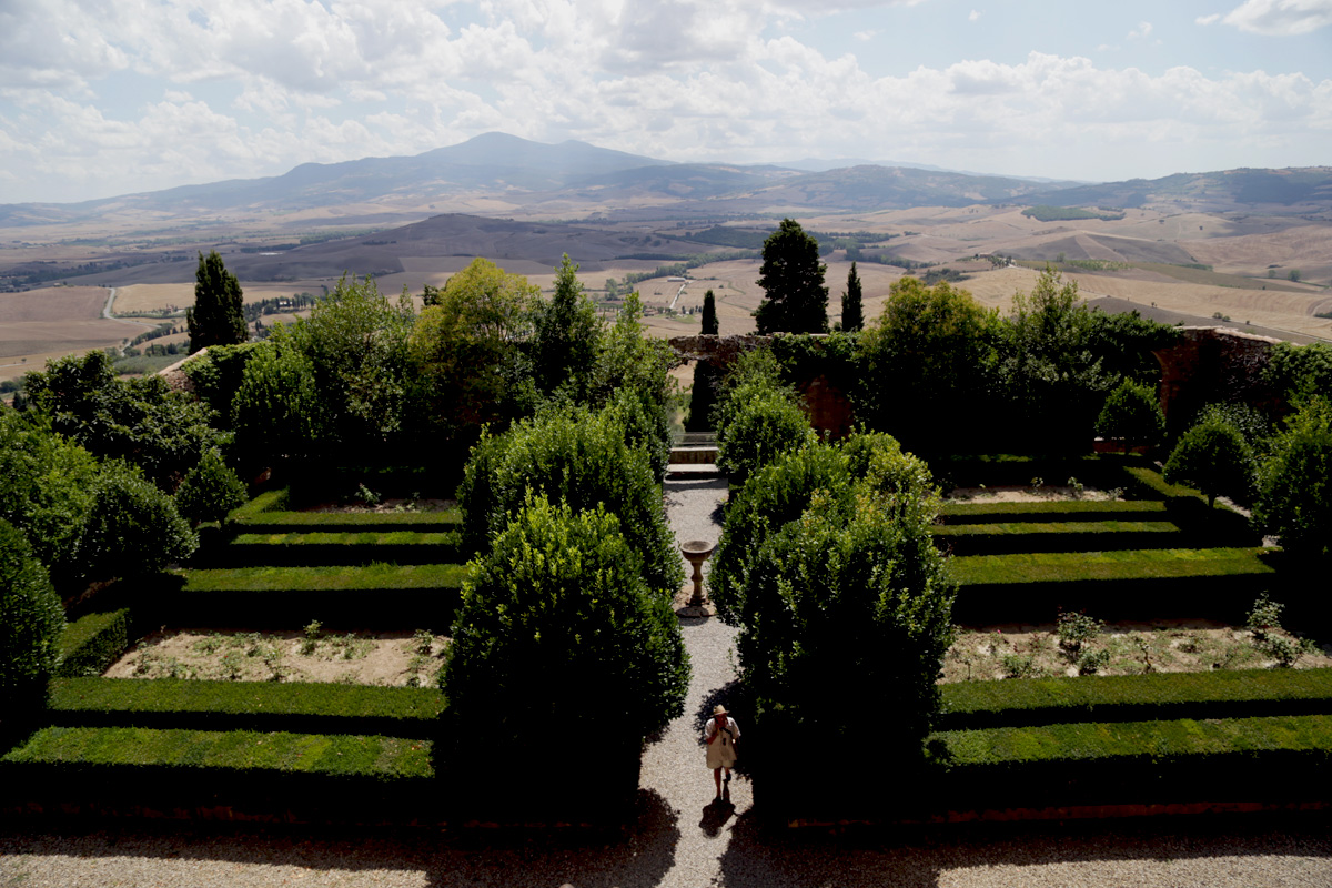 Palazzo Piccolomini, Pienza, Italia.